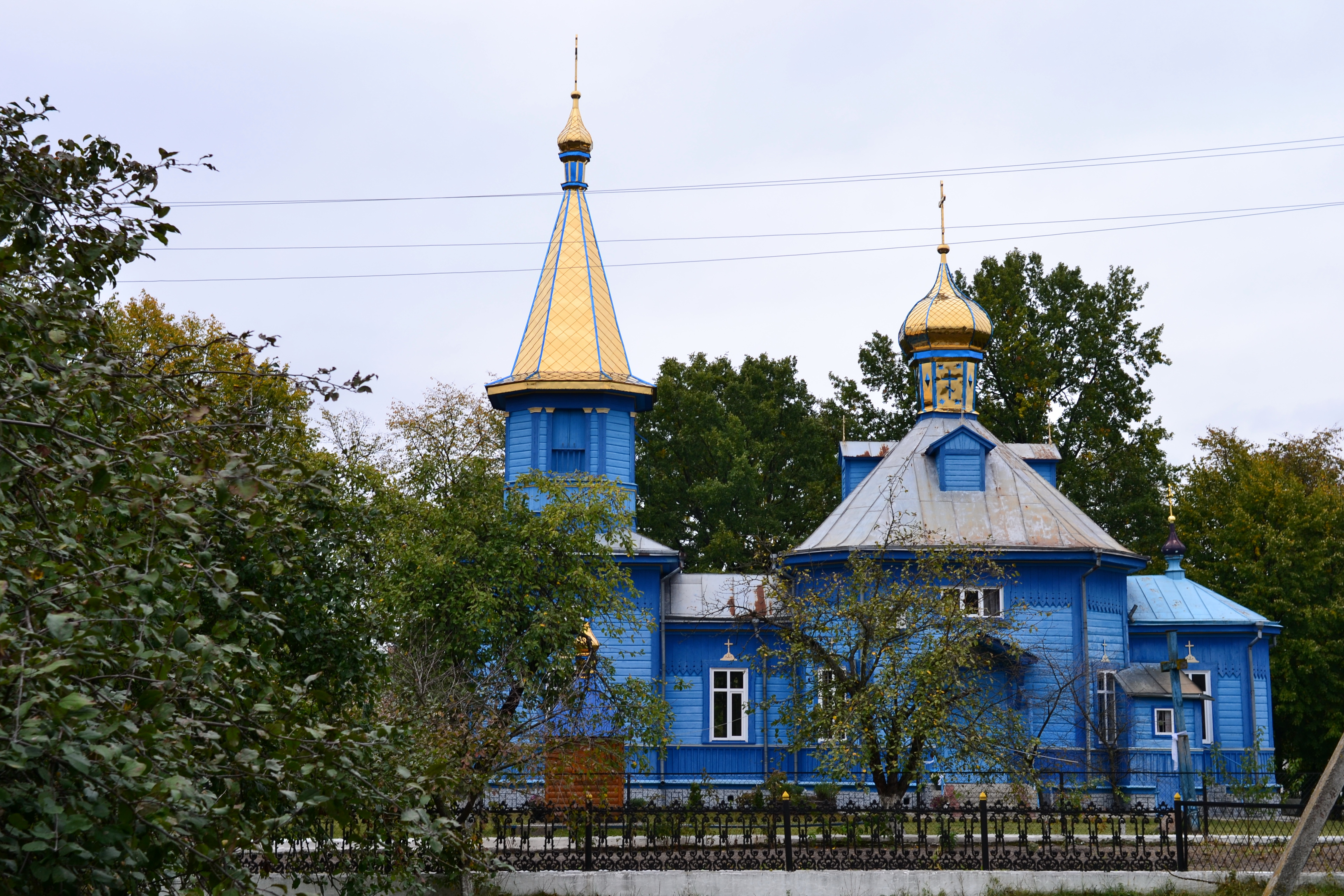 Церква Різдва Богородиці (дер.) (1902 рік) - вигляд з півдня - Сошичне (вул. Перемоги) Камінь-Каширський район Волинська область Україна